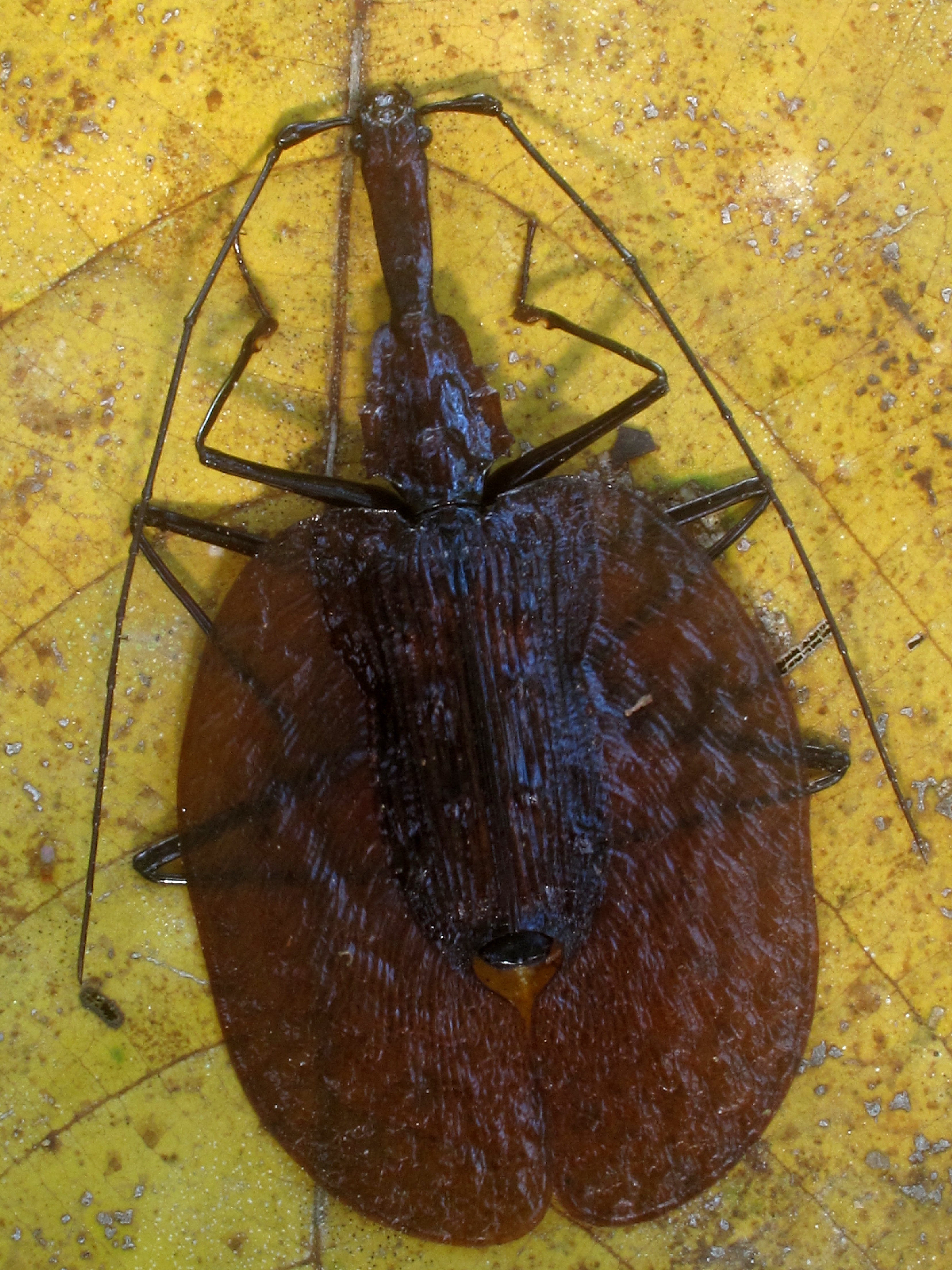 Mormolyce phyllodes, gunung mulu national park, sarawak, malaysia 1